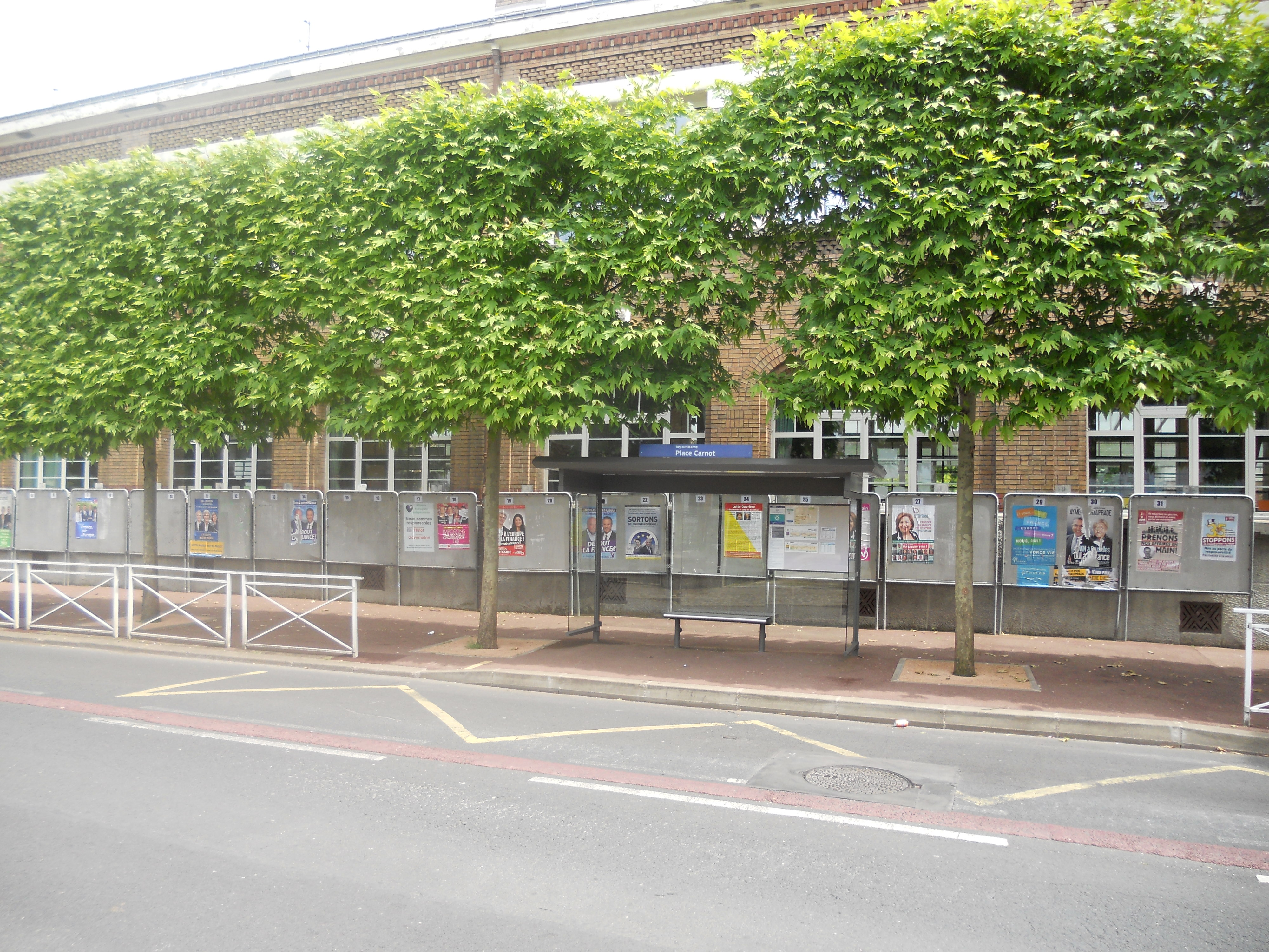 Photographie prise le 25 mai 2014 devant un bureau de vote à Bry-sur-Marne, dans la circonscription Île-de-France pour les élections européennes.